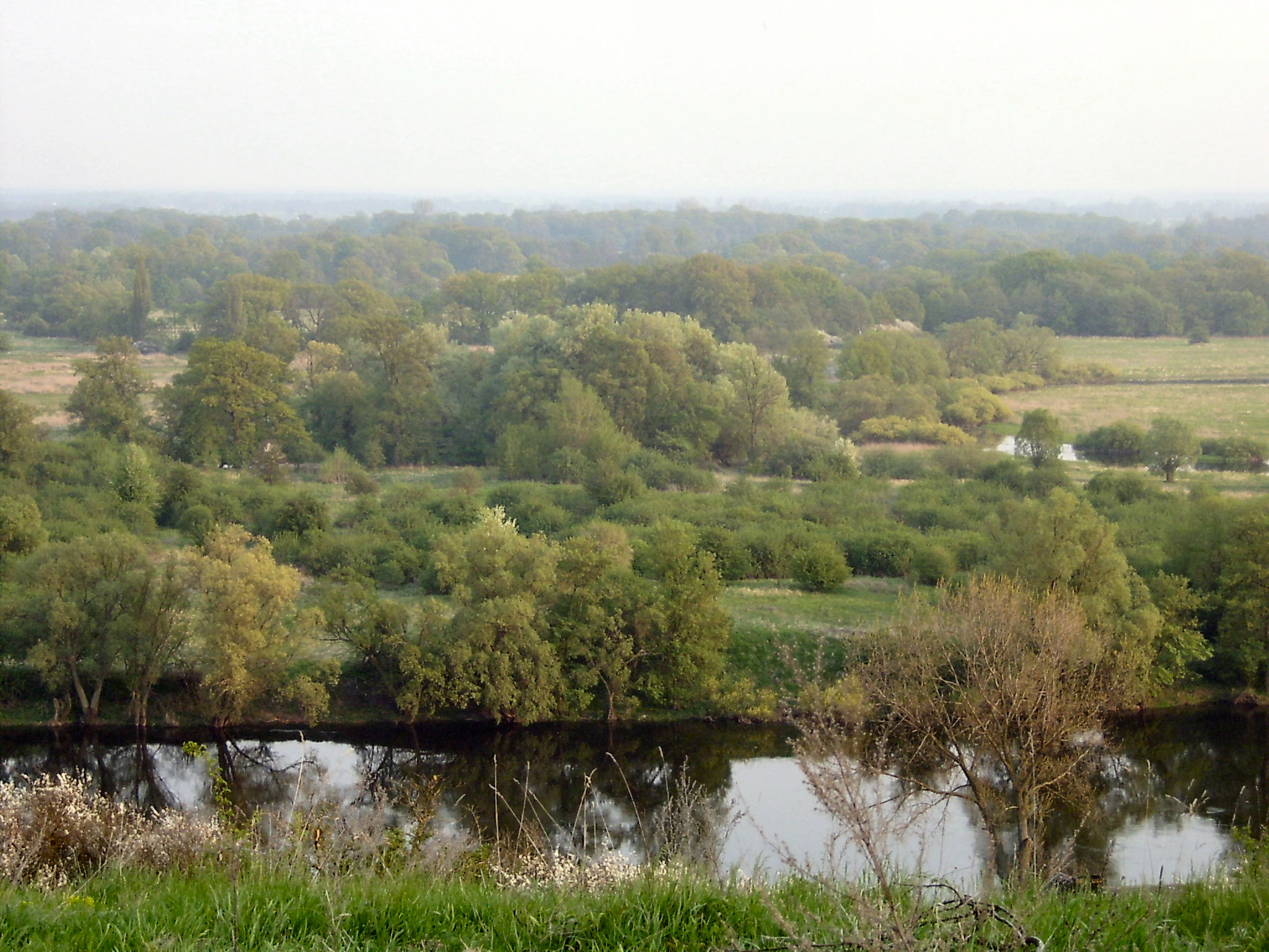 Santok widok na średniowieczne grodzisko